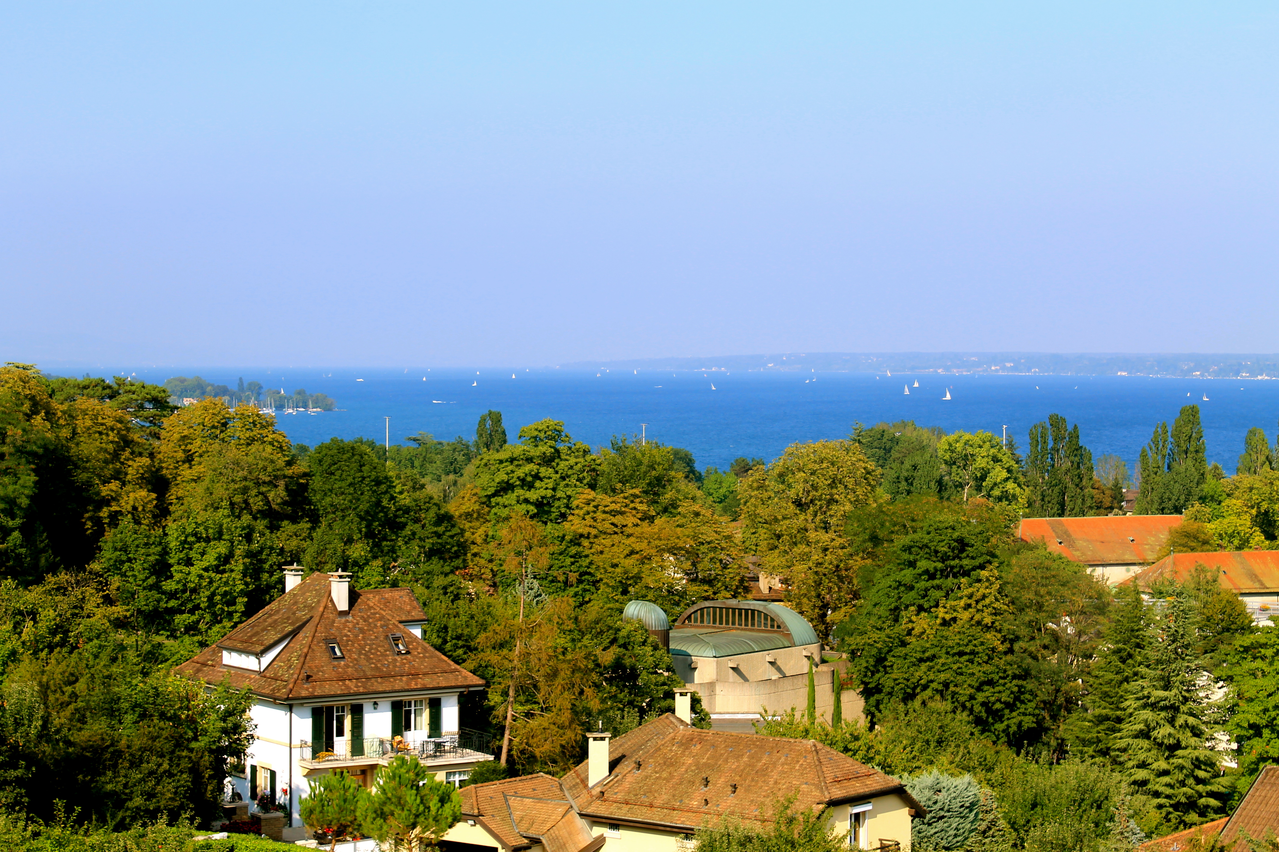 La vue depuis le coteau de Pregny-Chambésy, dans la campagne genevoise.